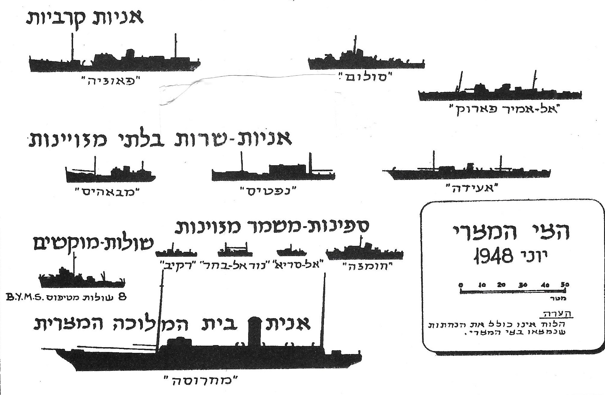 חיל הים המצרי במלחמת 1948